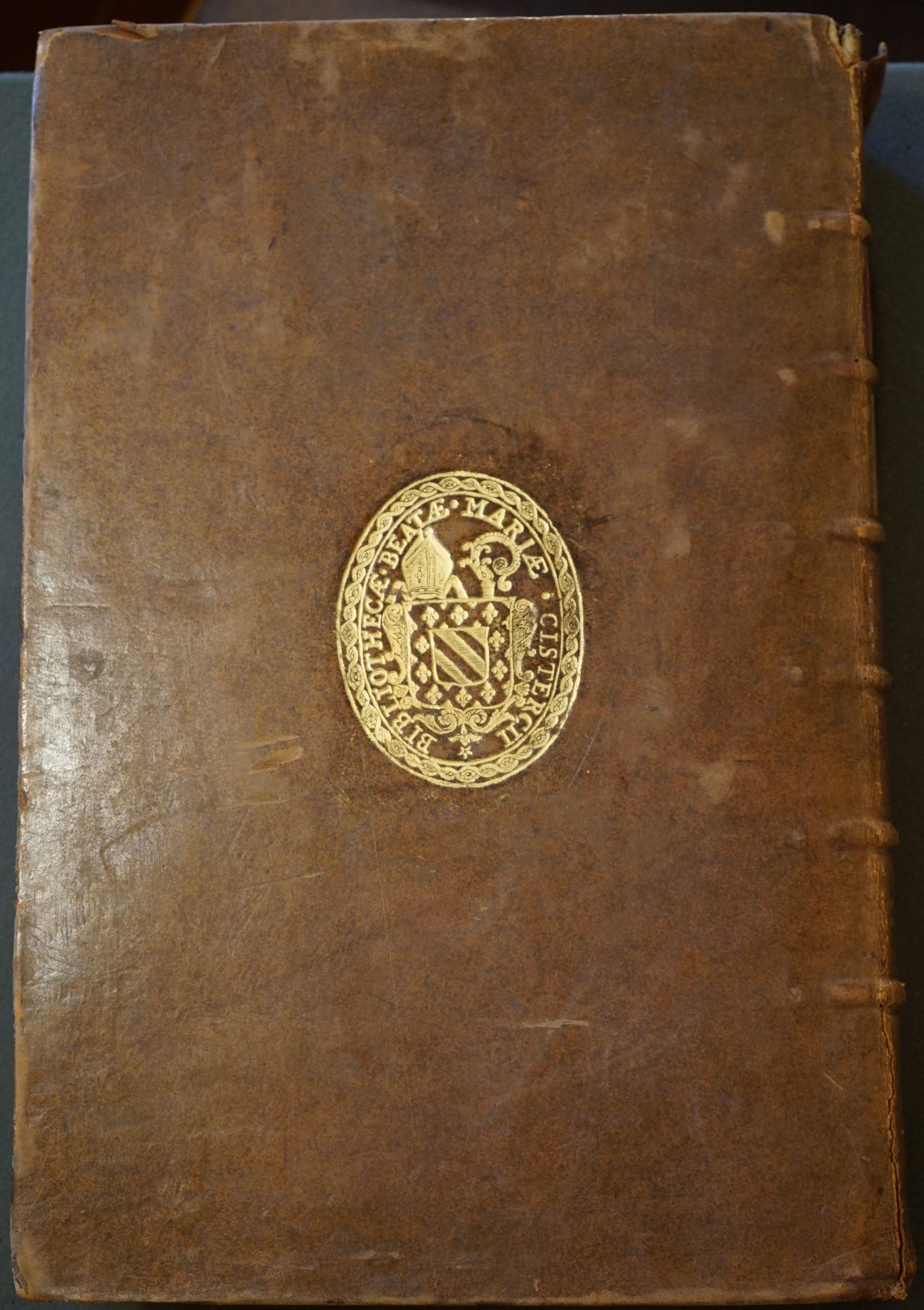 exemplaire provenant de Dijon, conservé à Reims.